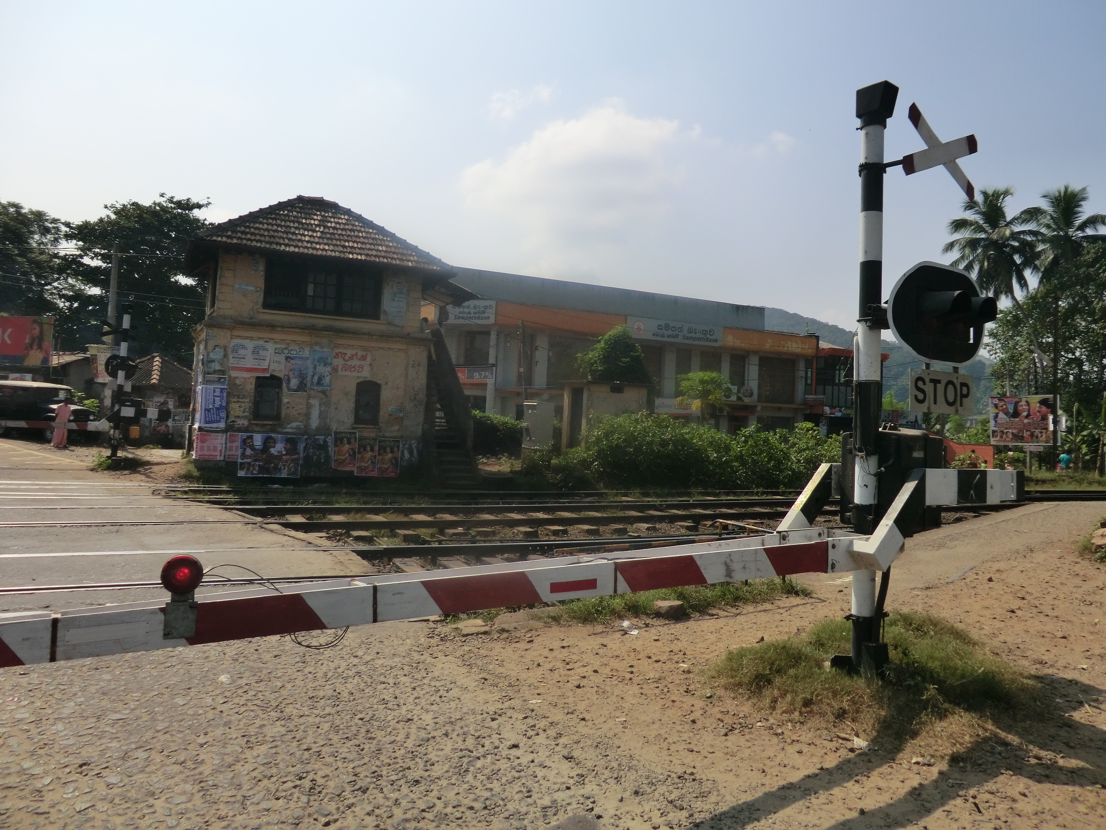 Alawwa, Sri Lanka